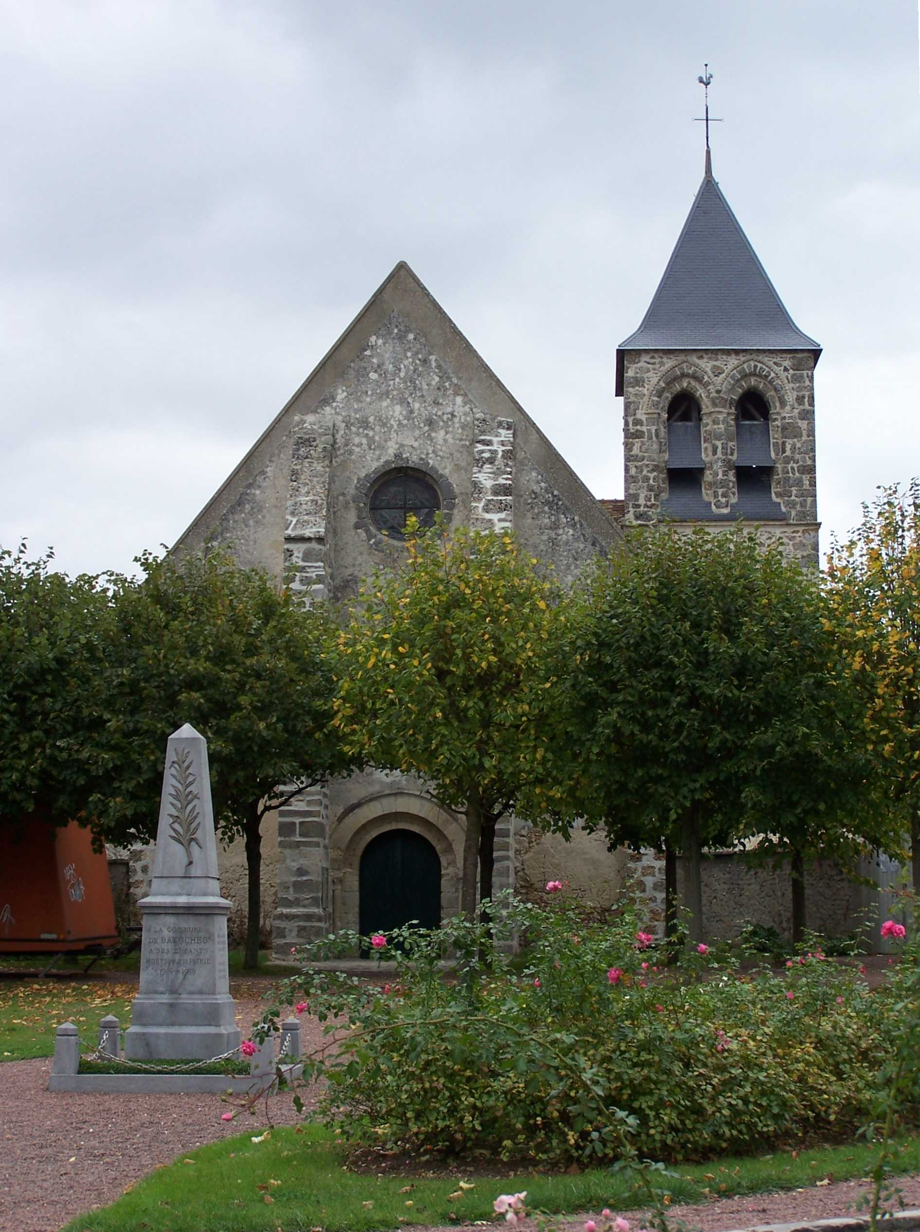 Église de Bazoches-sur-Guyonne (Yvelines, France)